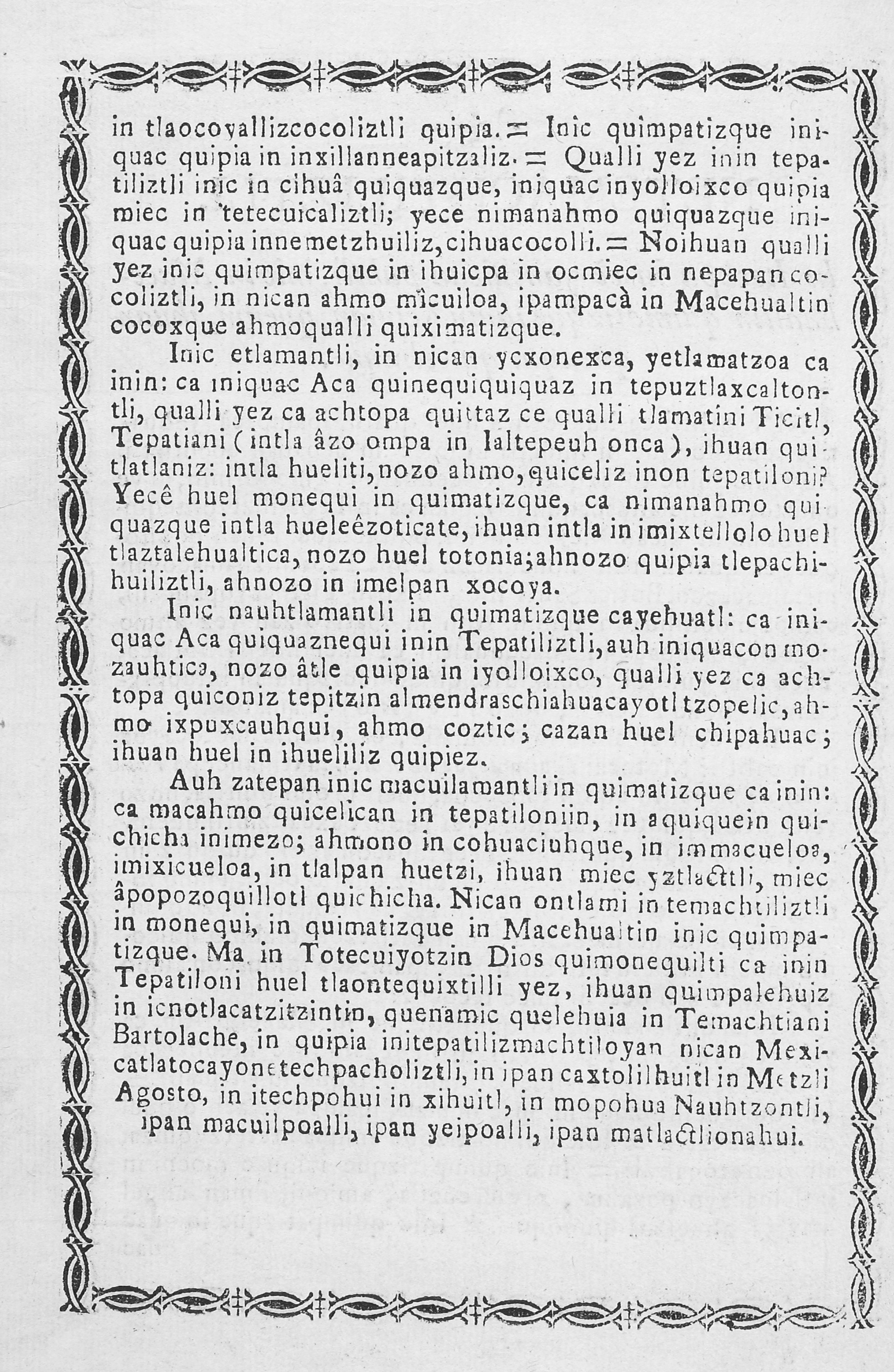 EPB American M.12 Bartolache, José Ignacio 'Instruccion para el buen uso de las pastillas marciales ó fierro sutíl nah Netemachtiliztli. In Itechpa in cè yancuican pahtli, inic in Macehualtin quimatizque iquin yeiman, quenin, ihuan quezqui quicelizque', José Ignacio Bartolache, Mexico, 1774(?) page 2 Rare Books Keywords: epb american m.12; nahuatl; aztec